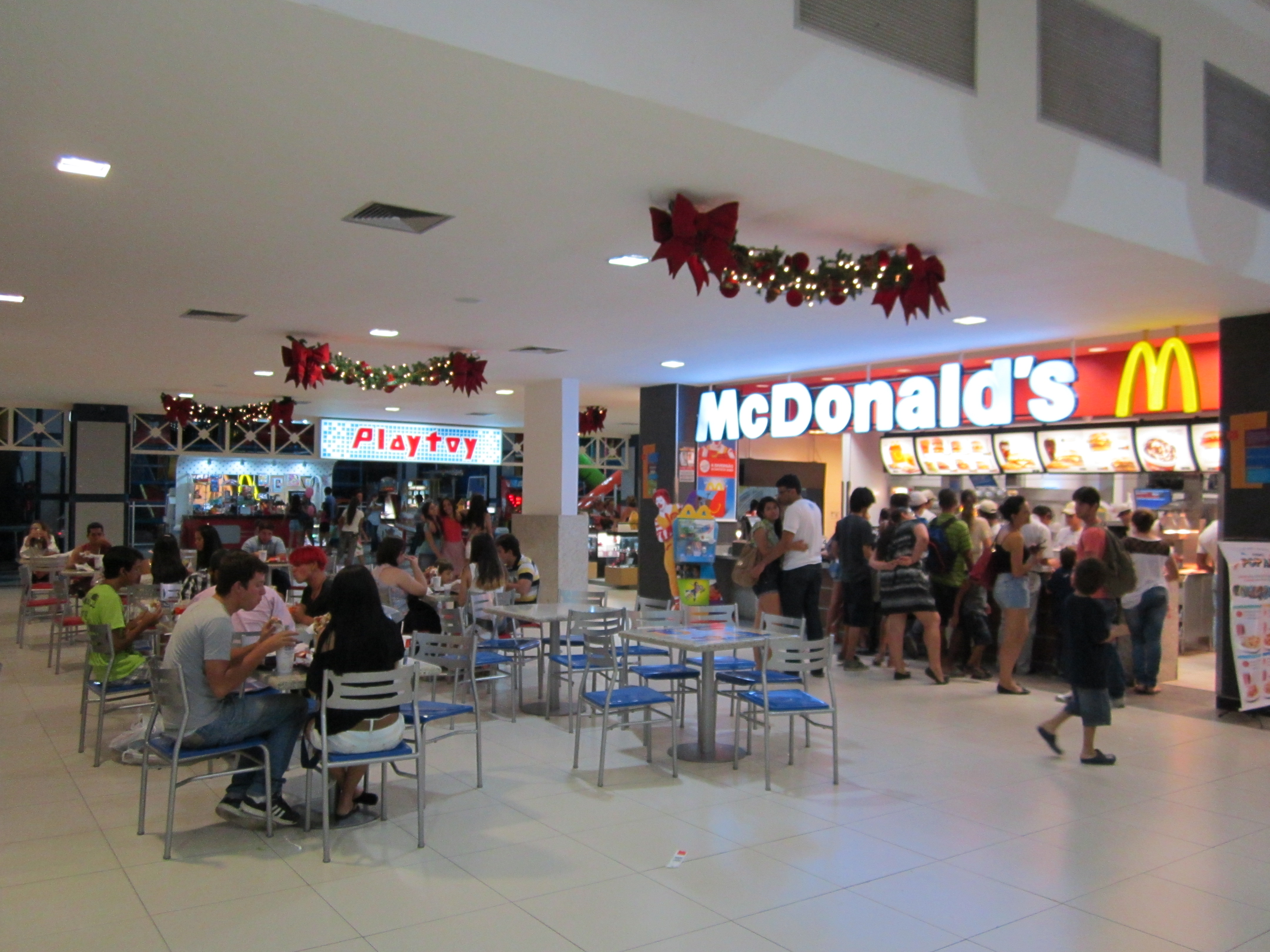 McDonald's do River Shopping - Petrolina, Pernambuco, Brasil.